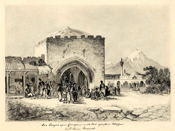 Der Bazar von Eriwan mit der großen Moschee und dem Ararat. 16.5 x 24 cm